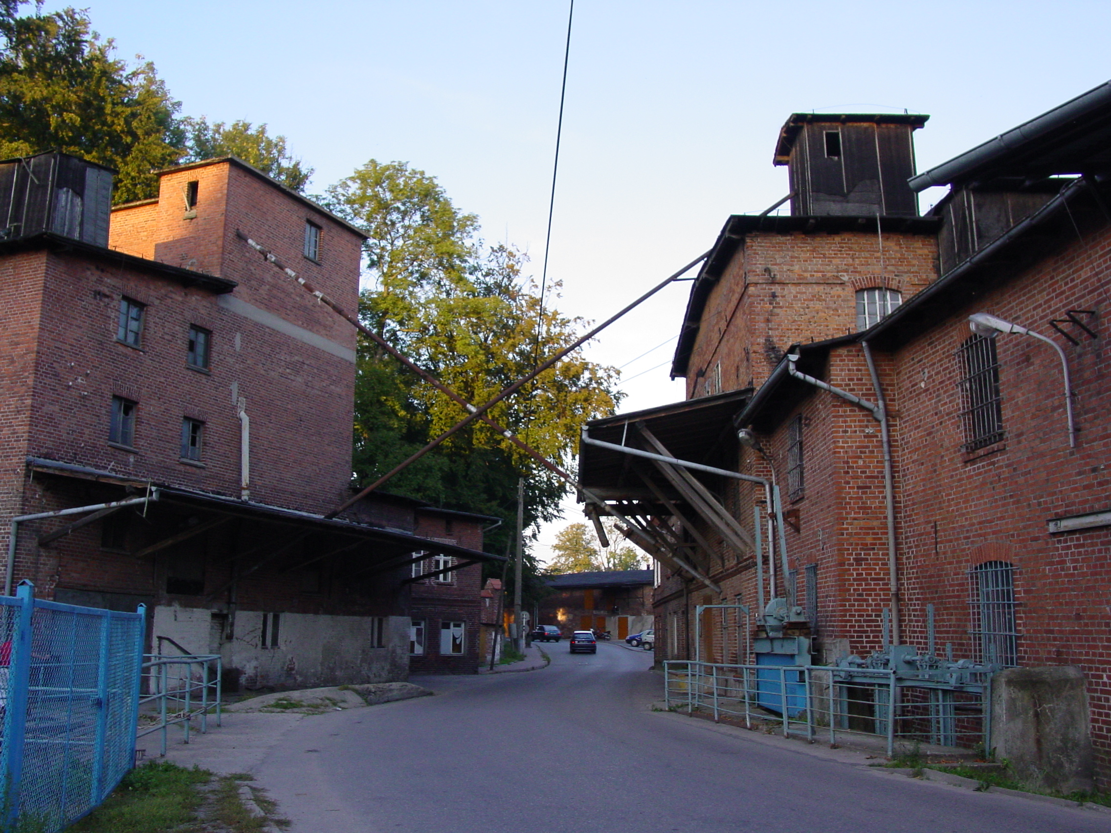 Żukowo. Młyn wodny na Raduni. Kaszëbsczi: Żukòwò, młin na Reduni